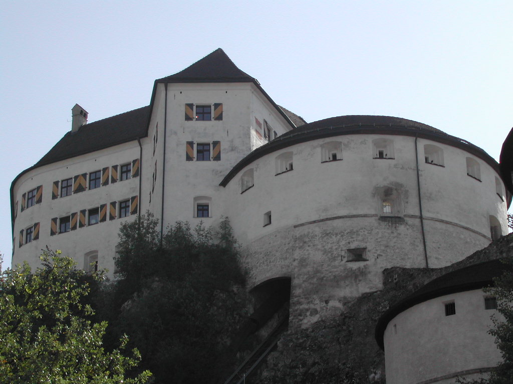 D'Festung vu Kufstein